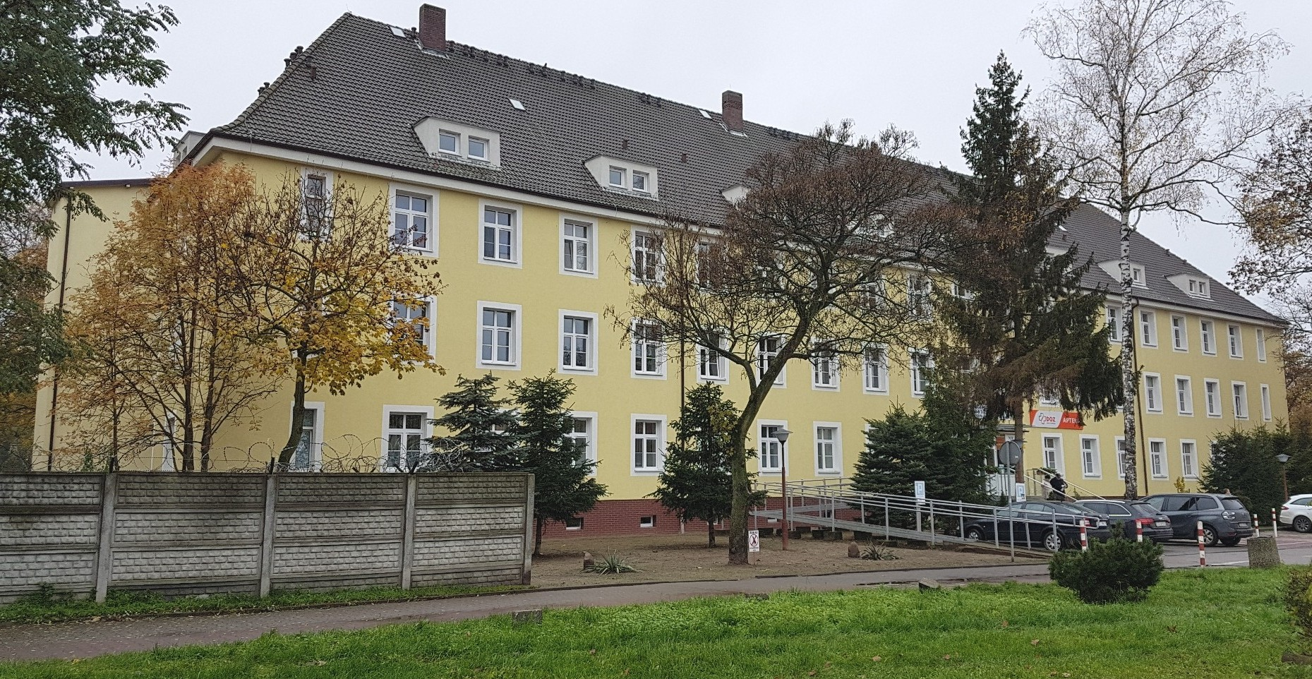 Stargard, 2019. WSPL SP ZOZ